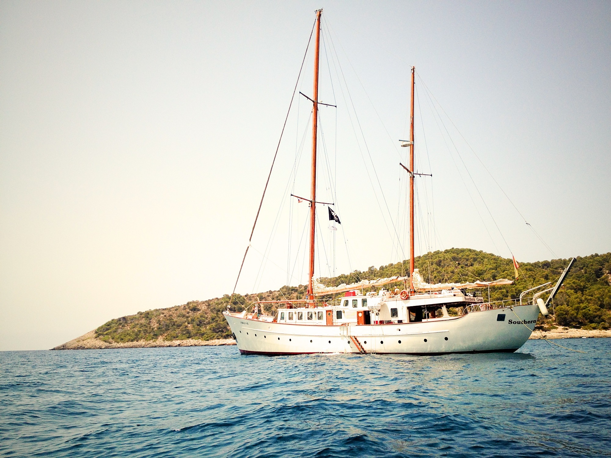 Vista panorámica.